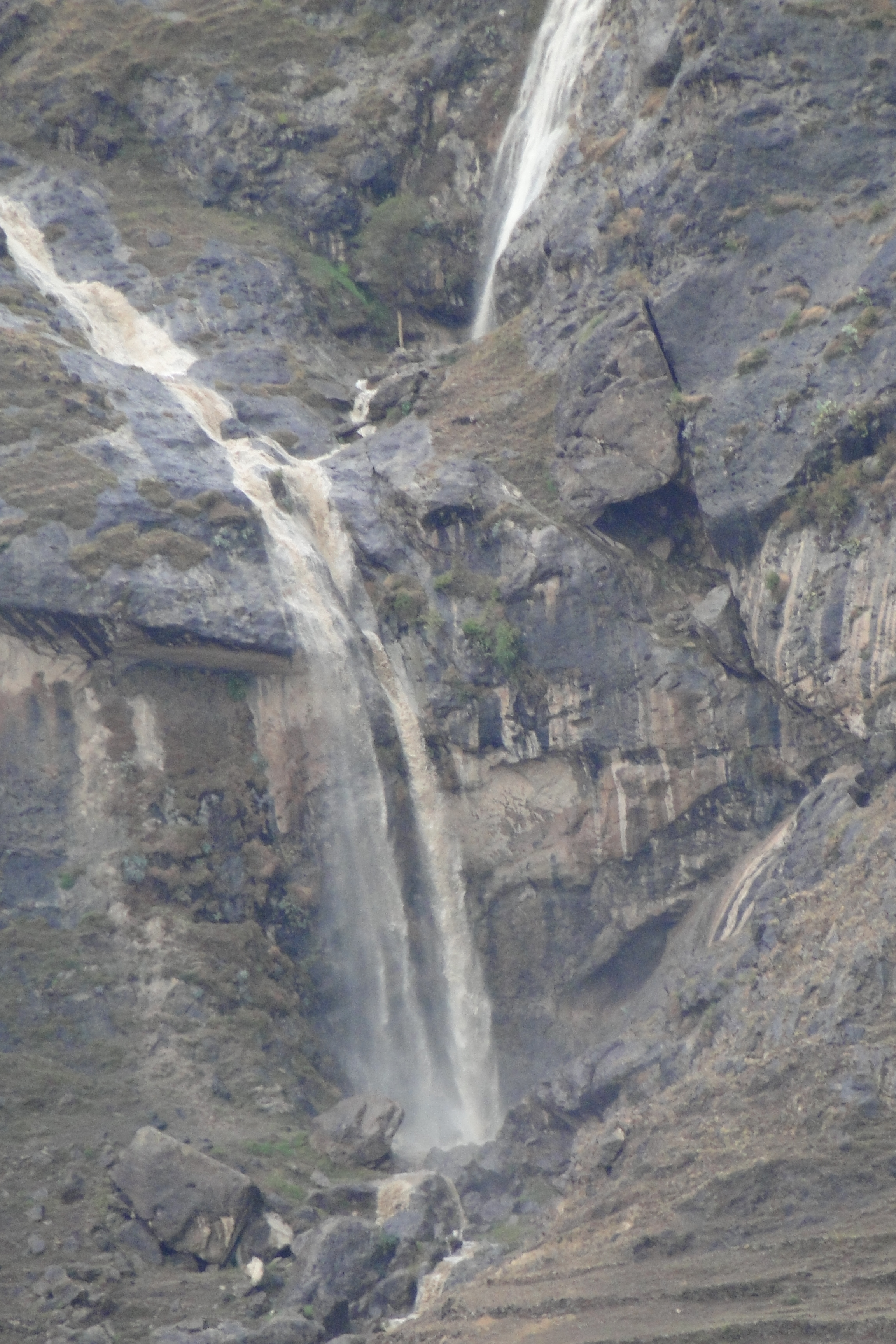 ريمه بني الضبيبي صور بعد نعمة الامطار